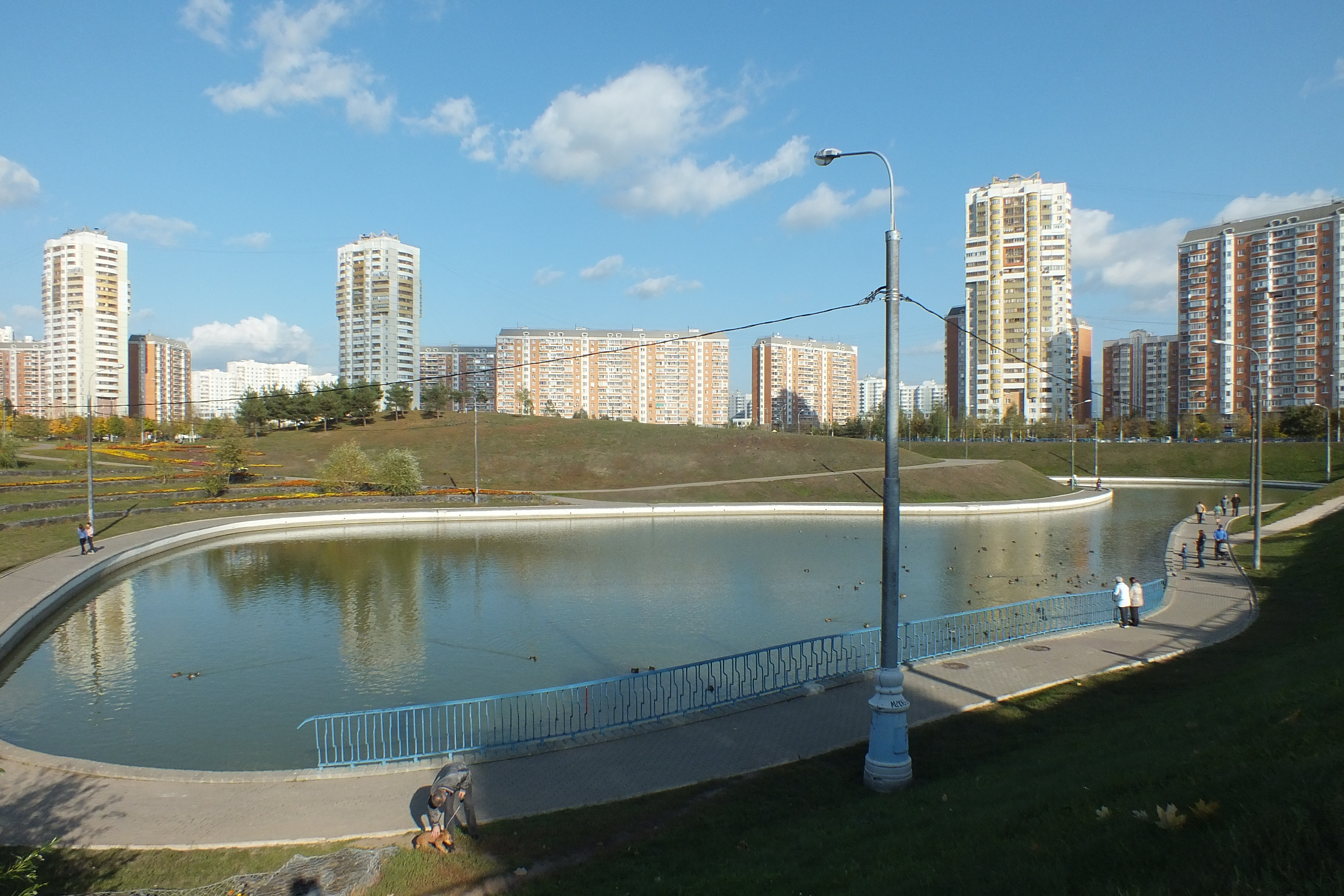 Дюссельдорфский парк, небольшой пруд.